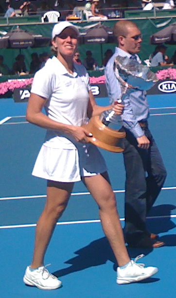 foto de Greta, tras ganar el campeona ASBclassic en Auckland, Nueva Zelanda